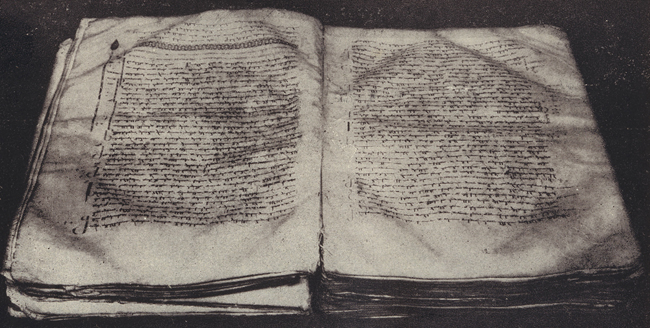 მიქეილ მოდრეკილის კრებული